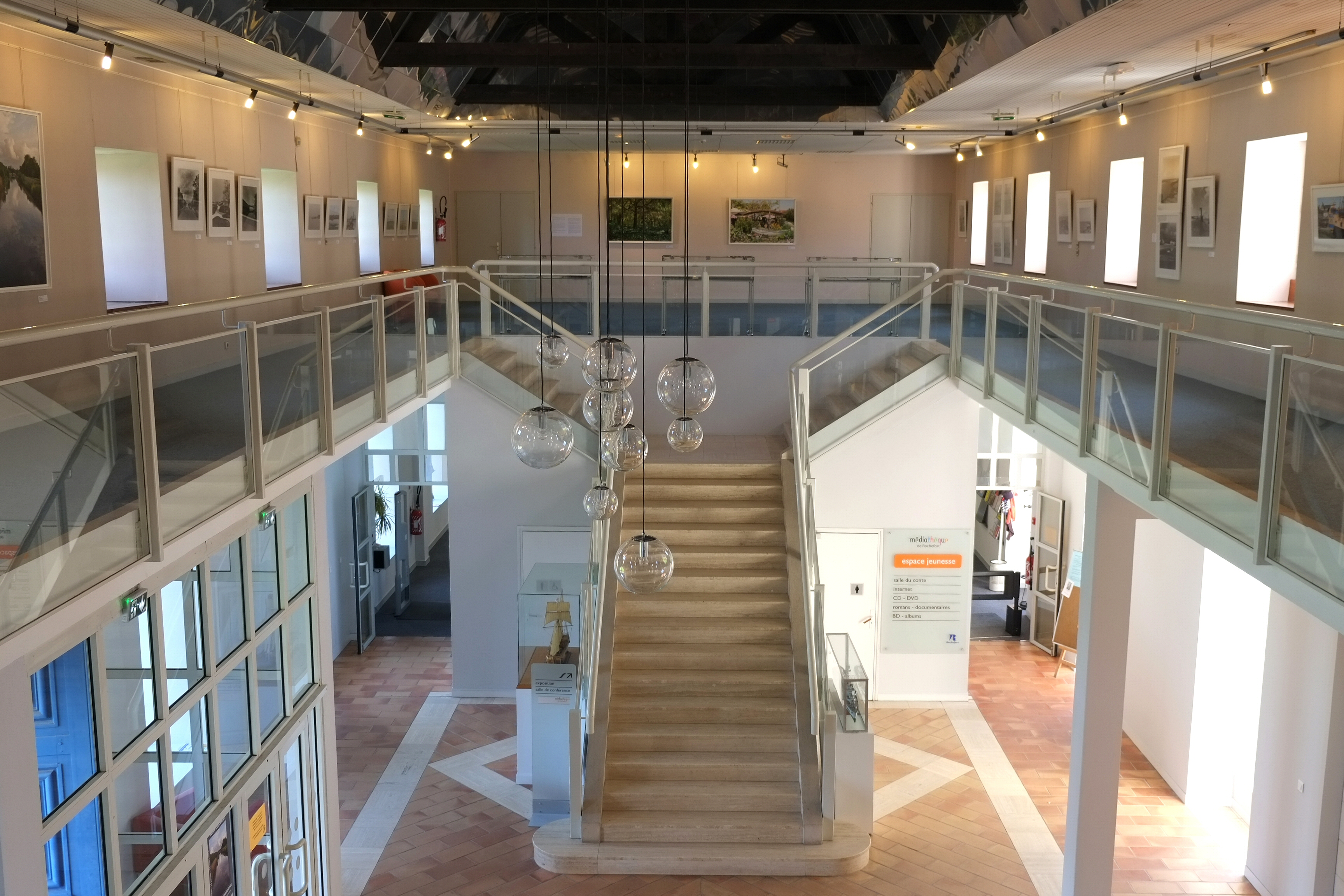 Médiathèque de la Corderie Royale Rochefort Charente-Maritime France